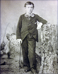 Es una foto de Marcelo Torcuato de Alvear de ñino.